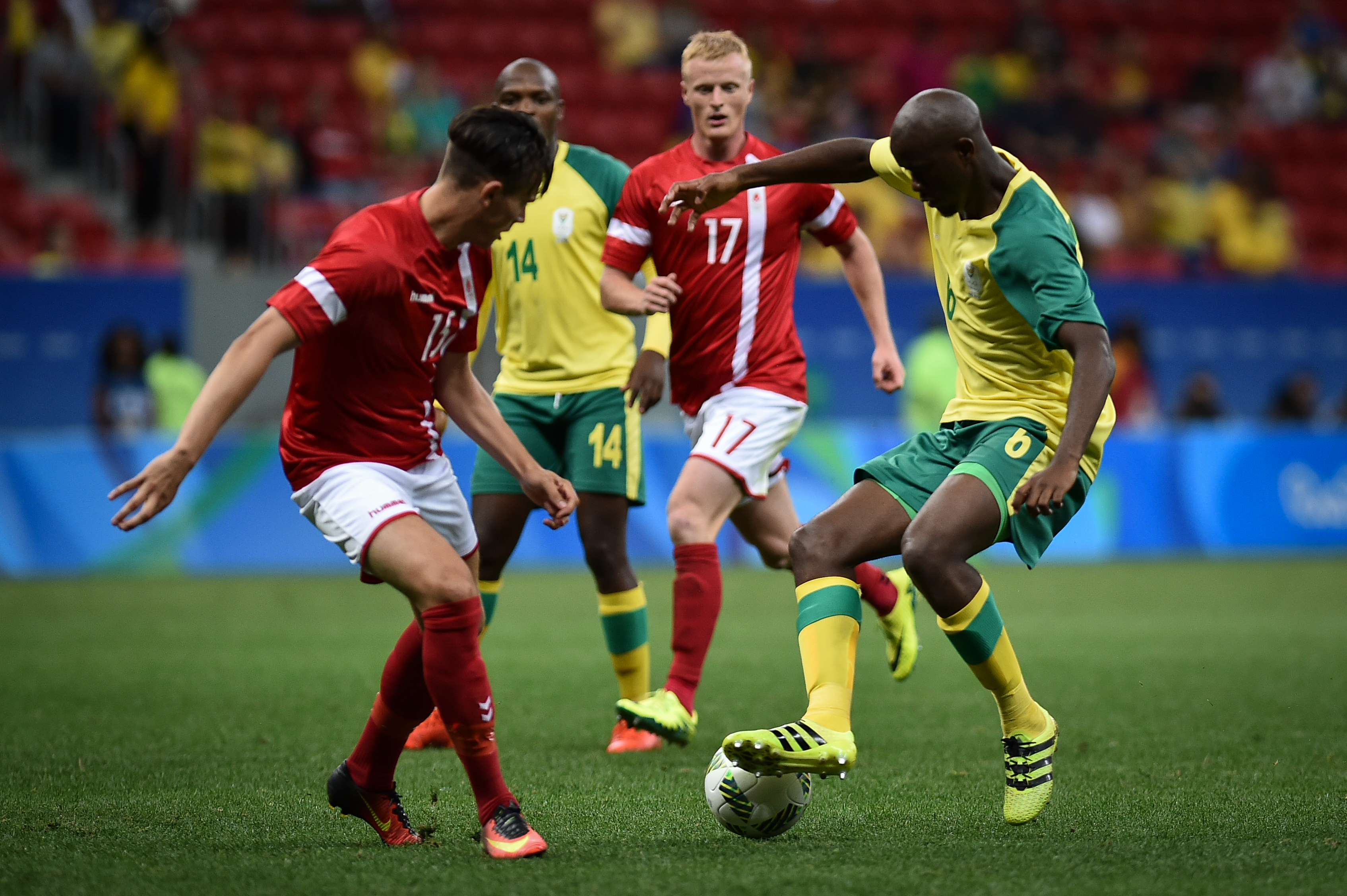 Estádio Nacional de Brasília Mané Garrincha, Brasília, DF, Brasil, 7/8/2016 Foto: Andre Borges/Agência Brasília. Dinamarca e África do Sul jogam neste domingo (7), no Estádio Mané Garrincha, pelo grupo A do futebol masculino nas Olimpíadas 2016. A Dinamarca venceu a África do Sul por 1x0, com gol de Robert Skov no segundo tempo.